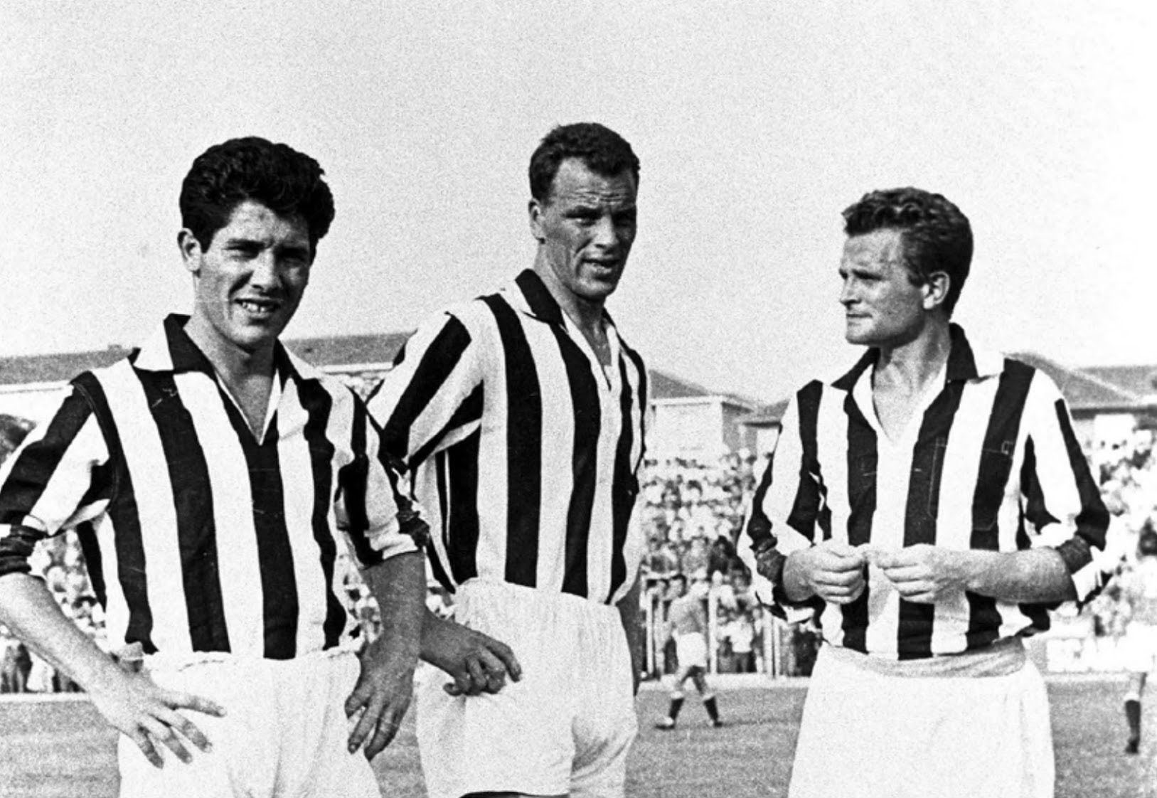 Il "Trio Magico" d'attacco della Juventus — da sinistra: l'italo-argentino Omar Sívori, il gallese John Charles e l'italiano Giampiero Boniperti — all'inizio della stagione 1957-58.